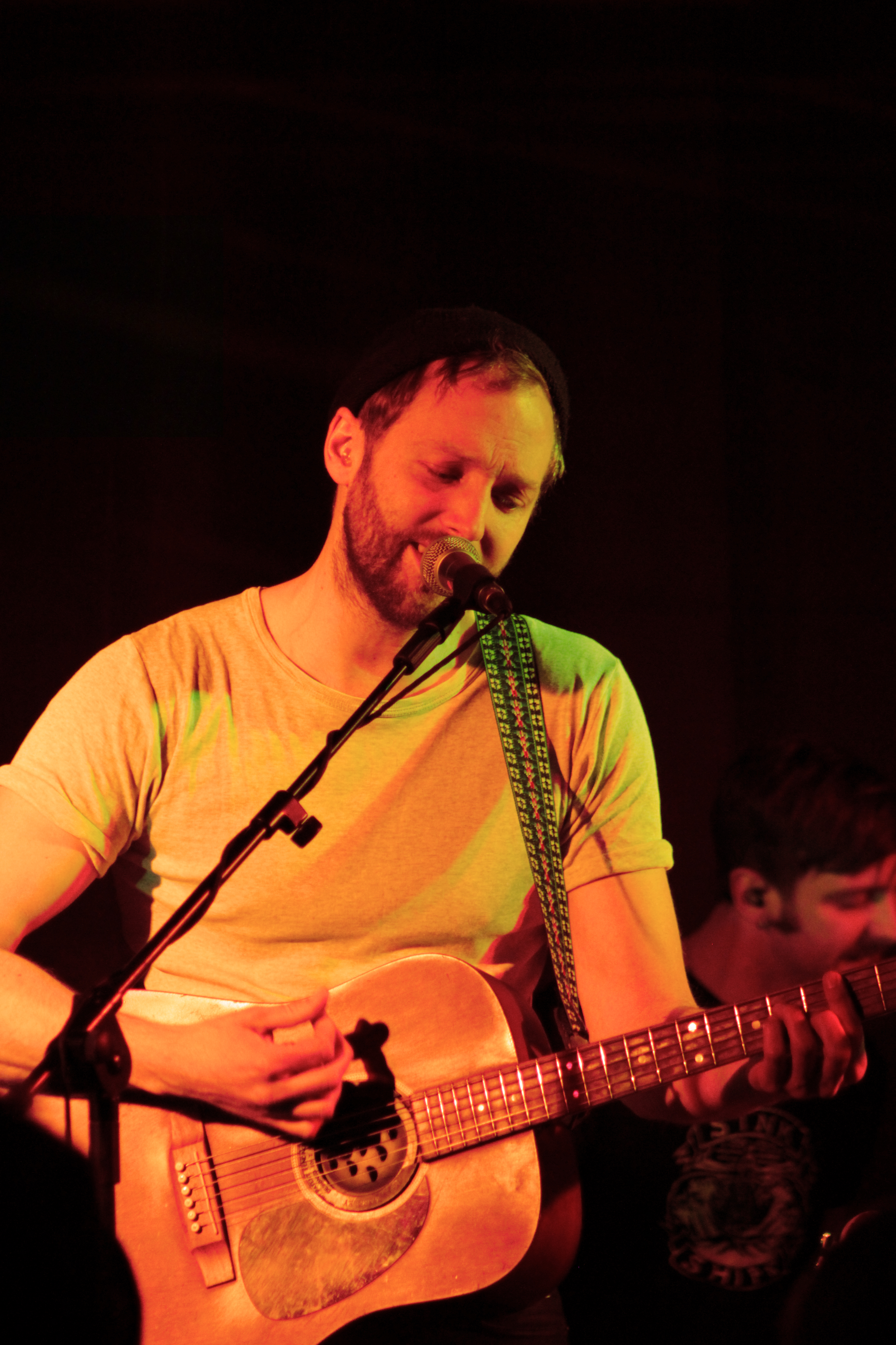 The Rumour Said Fires forsanger Jesper Lidang i Hadsten 2013. Foto: Jonas Søby